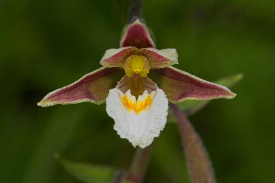 Epipactis palustris - Sumpf-Stendelwurz